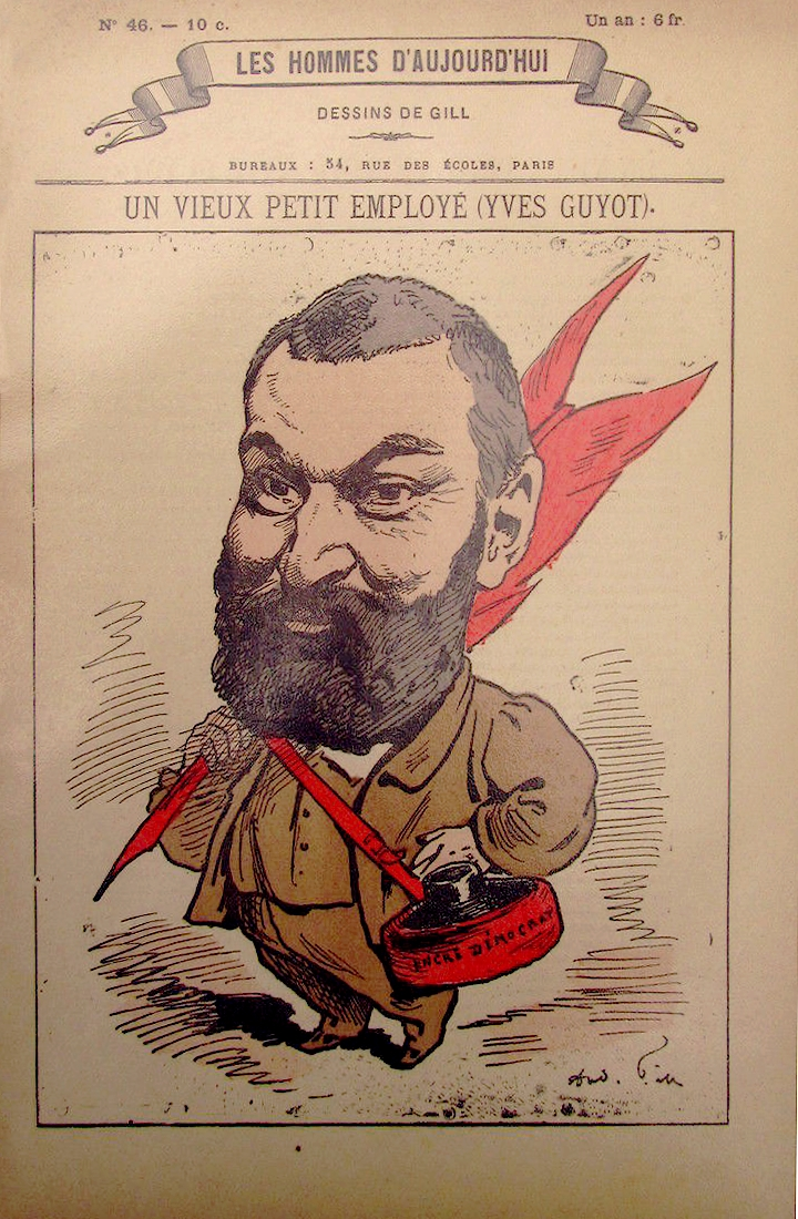 Yves Guyot (1843-1928), caricature par André Gill, Les Hommes d'aujourd'hui, n°46